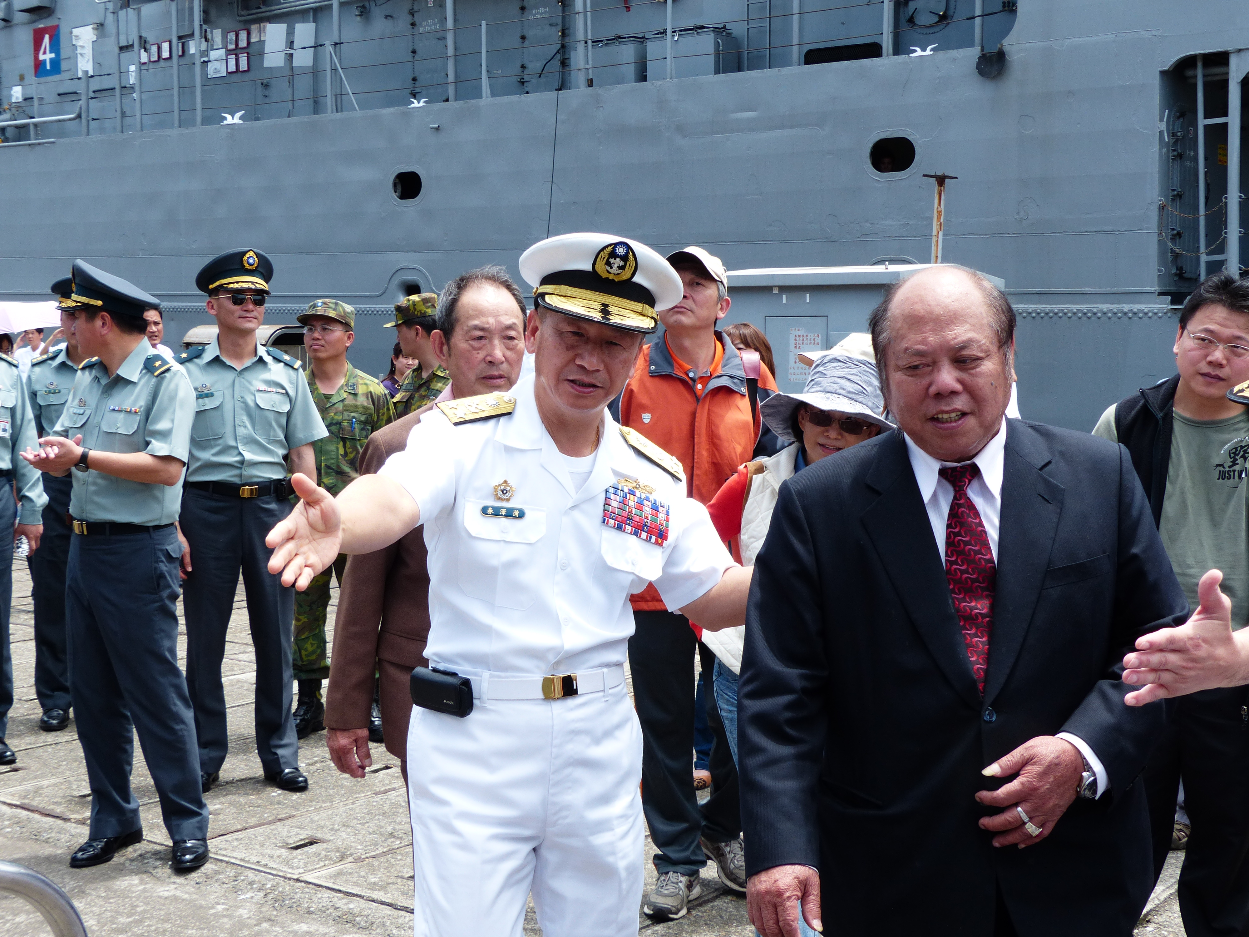 巡防艦子儀（PFG-1107）舷梯前，海軍艦隊指揮部司令蒲澤春中將（左）謙讓蘇澳鎮鎮長林騰煌（右）先行登艦。